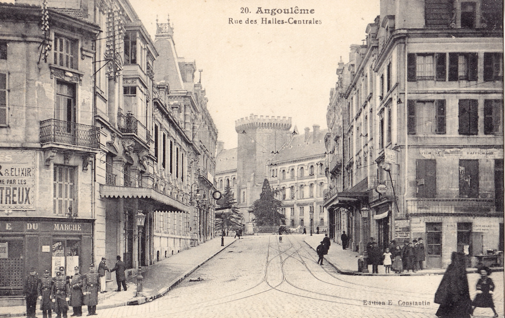 Carte postale ancienne éditée par E. Constantin, n°20 : ANGOULÊME - Rue des Halles-Centrales